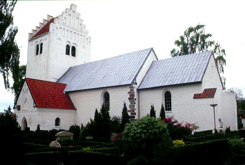 Egå Kirke ligger i lidt nord for Århus i Århus Kommune, tidligere Øster Lisbjerg Herred, Randers Amt.